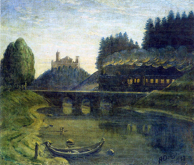 1936 г. Матэр'ял і тэхніка палатно, алей Памеры 59,5 х 69 Месцазнаходжанне Мастацкі фонд Беларускага саюза мастакоў (Полацкая мастацкая галерэя)